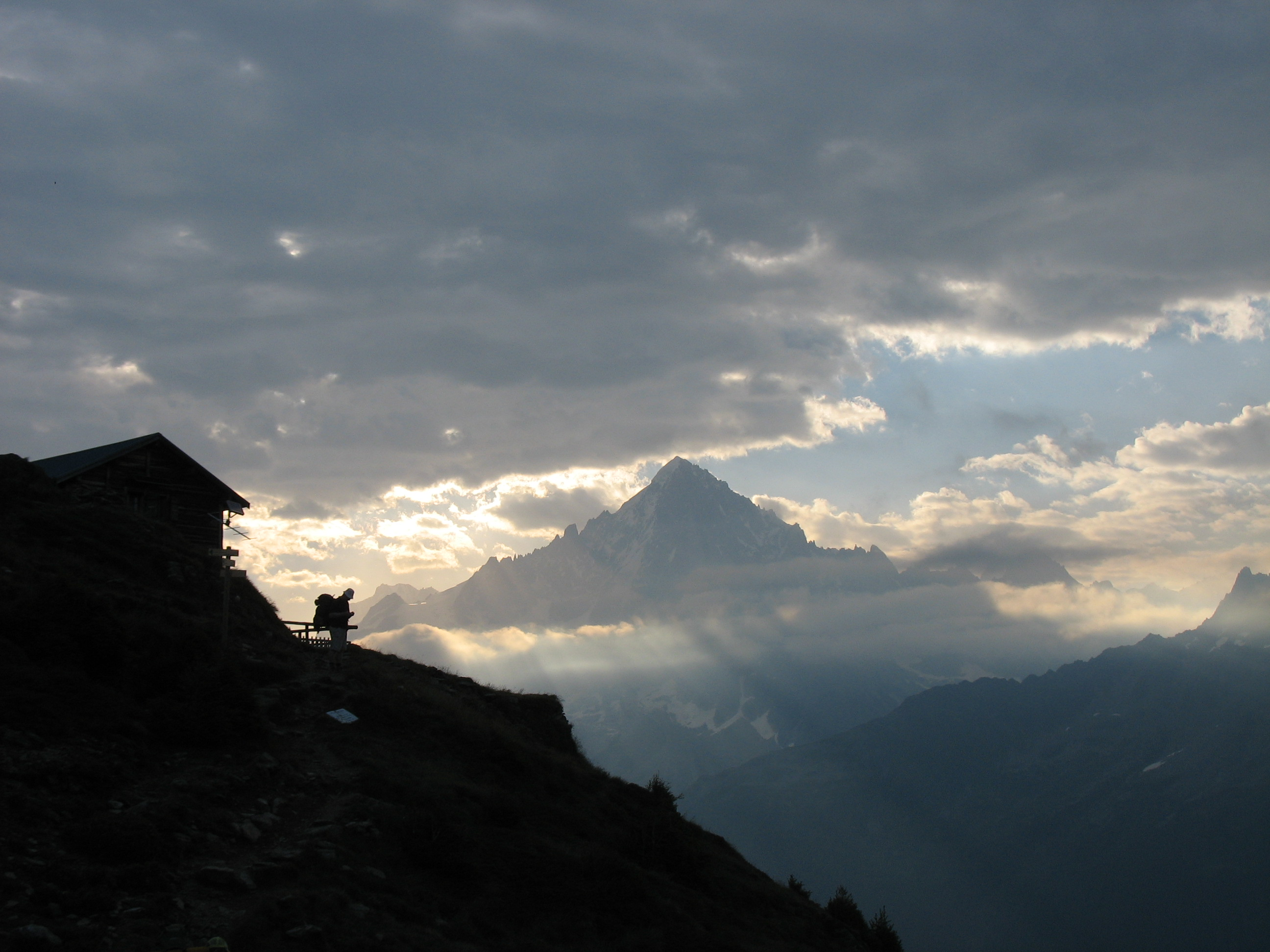 Randonneur se préparant à quitter le refuge de Bel Lachat sur le GR5